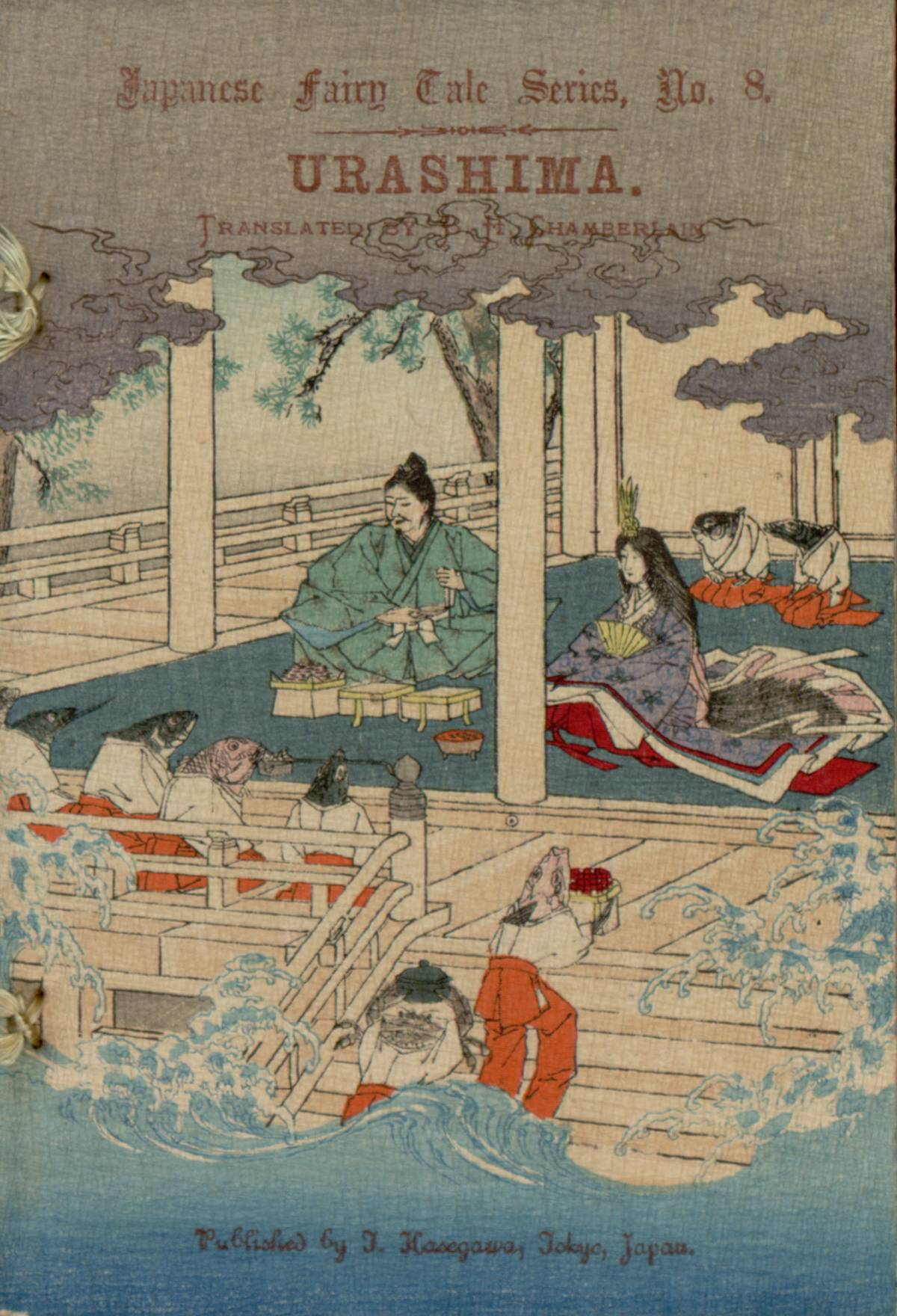 Coberta del llibre: Urashima = Ourasima, le petit pêcheur / translated by B. H. Chamberlain.-- Tokio : Takejiro Hasegawa, [18--?] (Les Contes du vieux Japon ; 8)